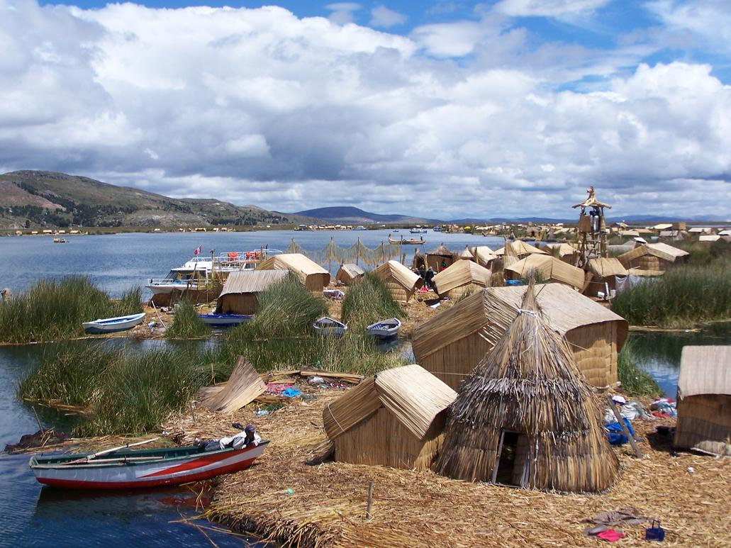 Islas flotantes de Uros en el Lago Titicaca